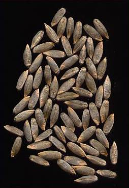 Roggenkörner. Secale cereale.